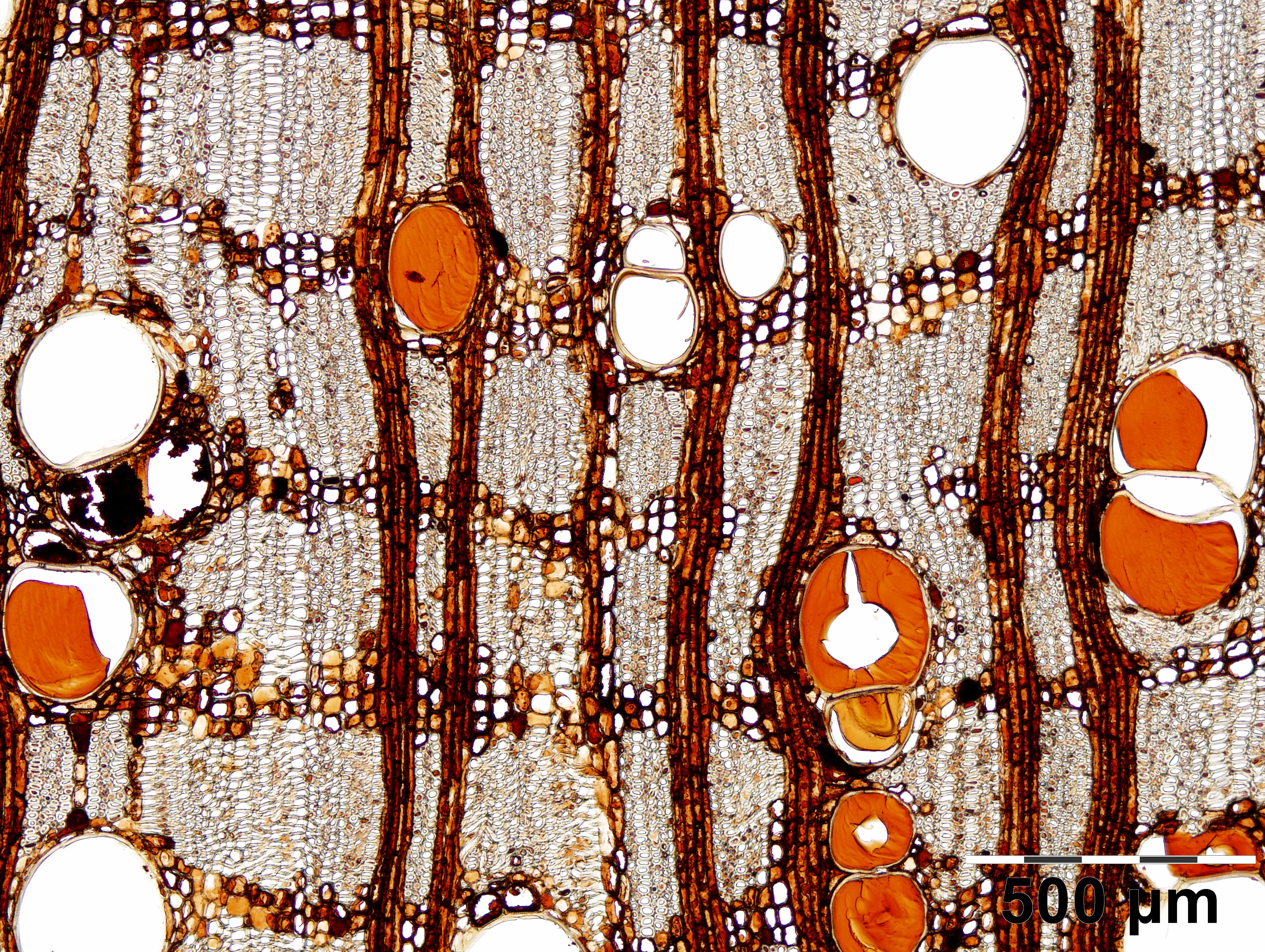 Querschnitt_des_Entadrophragma_candollei